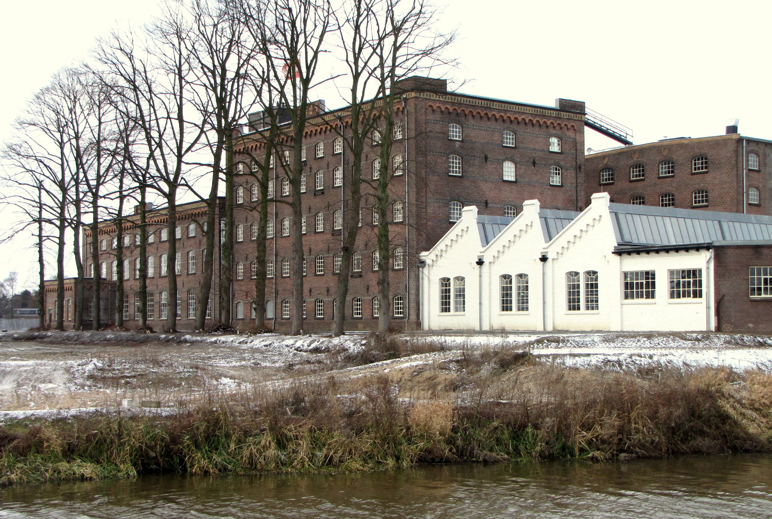 DRU-fabriek in Ulft (Oude IJsselstreek) aan de Oude IJssel, blik op de bibliotheek (wit).